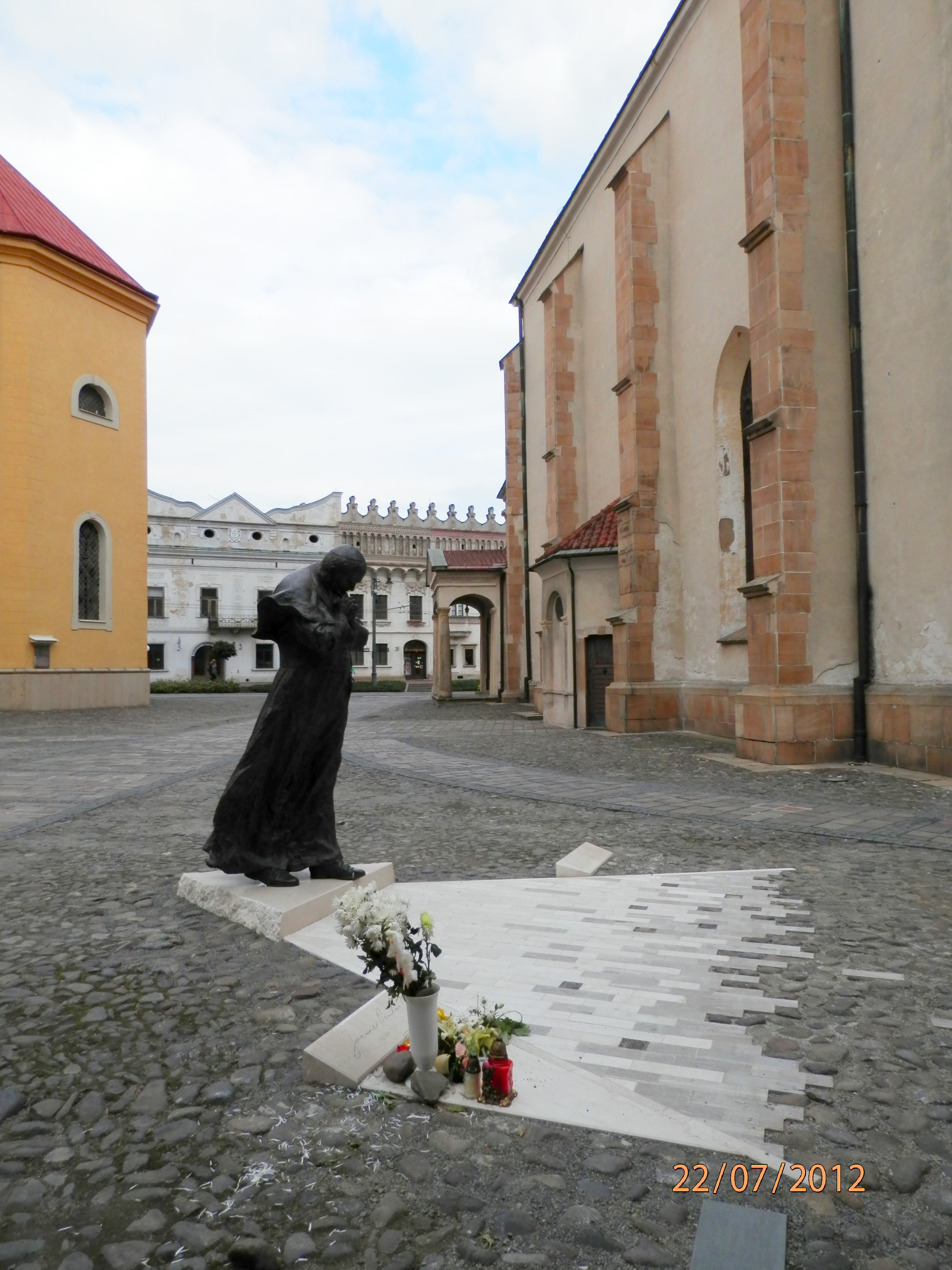 Socha pápeža Jána Pavla II.Mesto Prešov